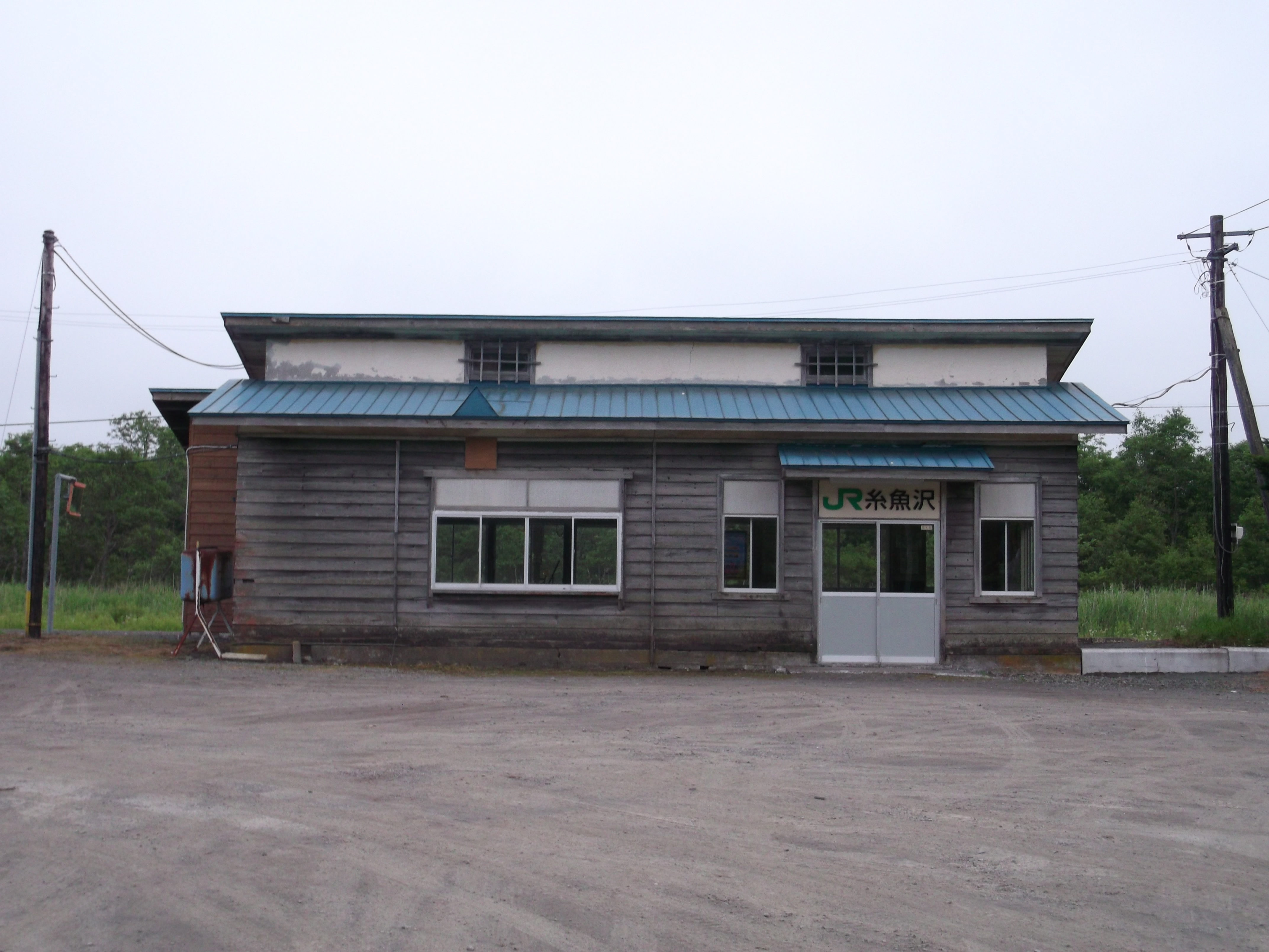 JR根室本線（花咲線）糸魚沢駅 駅舎